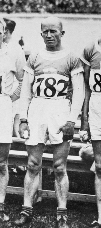 Olympische Spelen 1928 Amsterdam, Nederland. Atletiek. Finse marathonlopers. Yrjö Korholin-Koski.